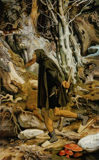 Rübezahltitle QS:P1476,de:"Rübezahl" label QS:Lde,"Rübezahl"